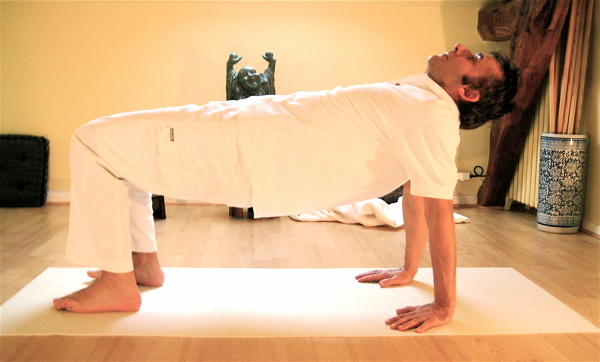 Yoga postures Catushpadapitham